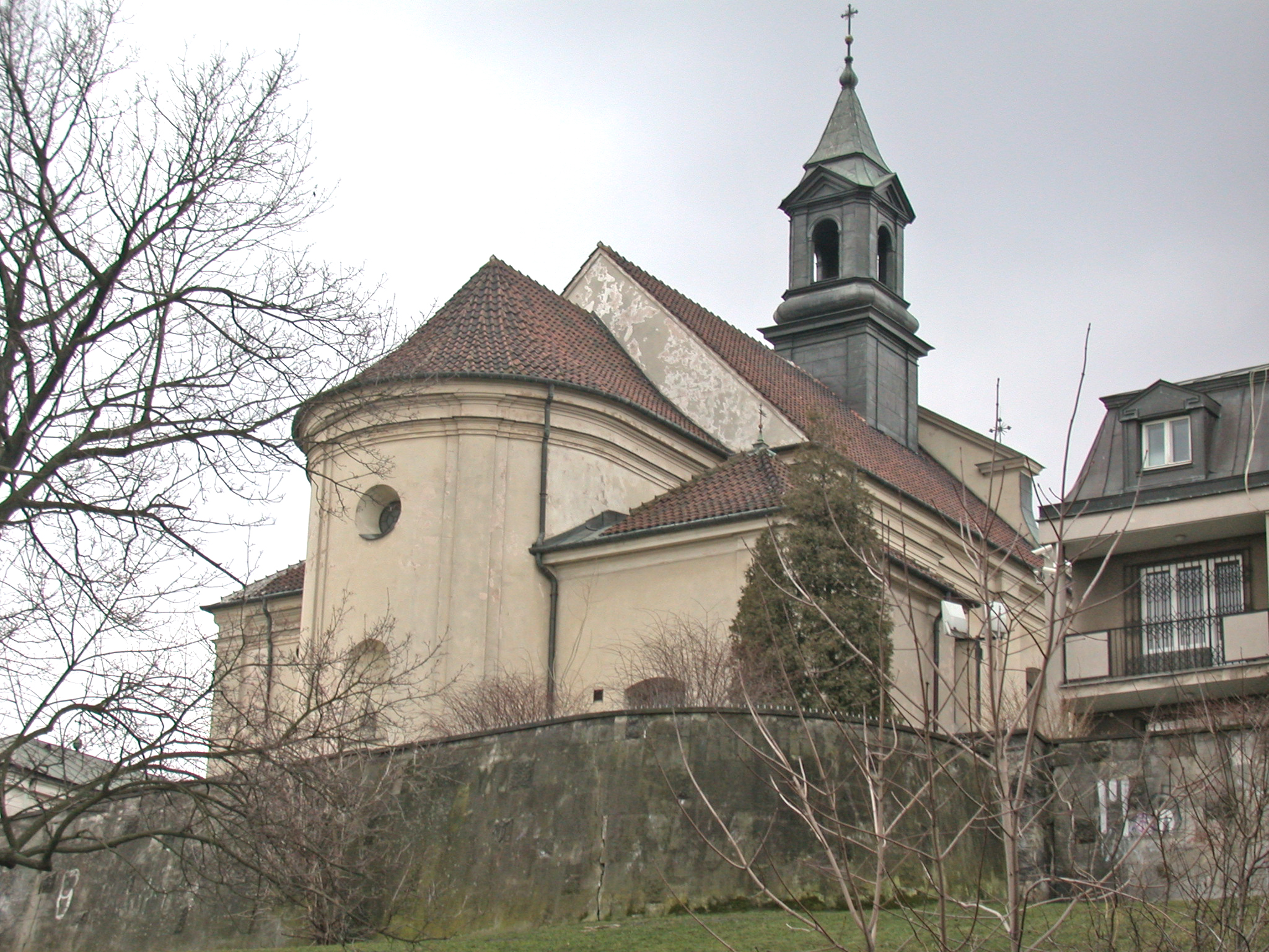 Varsavia, chiesa di San Benon (kóściół Św. Benona), il retro dal fiume Vistola (Wista).